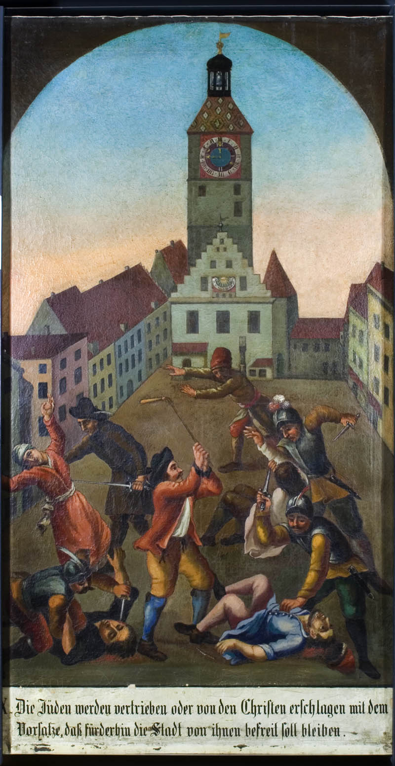 Der Judenmord in Deggendorf von Philip Neri Miller, 1710, Gemälde auf Öl